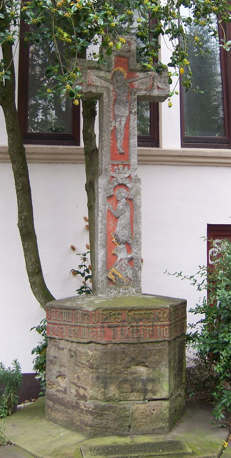 Steinkreuz für Bürgermeister Vasmer (Replik auf Original-Sockel) in der Straße Beim Steinernen Kreuz. Original von 1435 befindet sich im Bremer Focke Museum. Das abgebildete Objekt ist ein geschütztes Kulturdenkmal in der Freien Hansestadt Bremen, mit der Nr. 0116 beim Landesamt für Denkmalpflege registriert. k: kunst im öffentlichen raum bremen